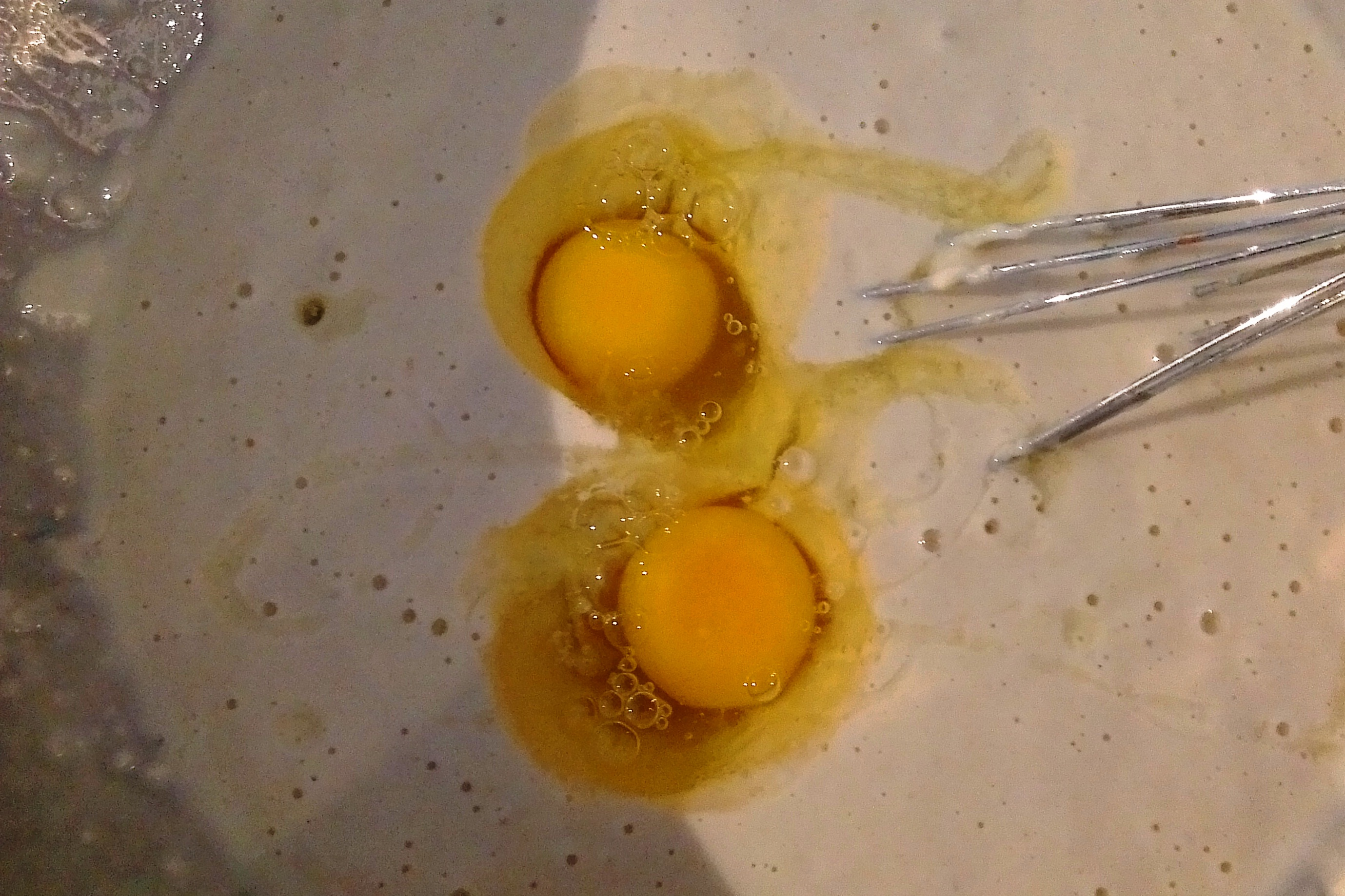 Beslag voor pannenkoeken: bloem, melk en eieren.